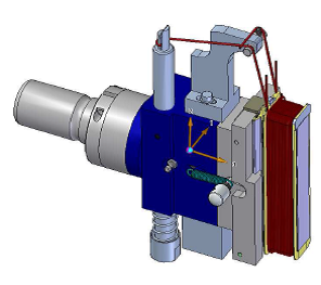 Wickelwerkzeug für die Aufnahme eines T-Segmentes für die Linearwickeltechnik